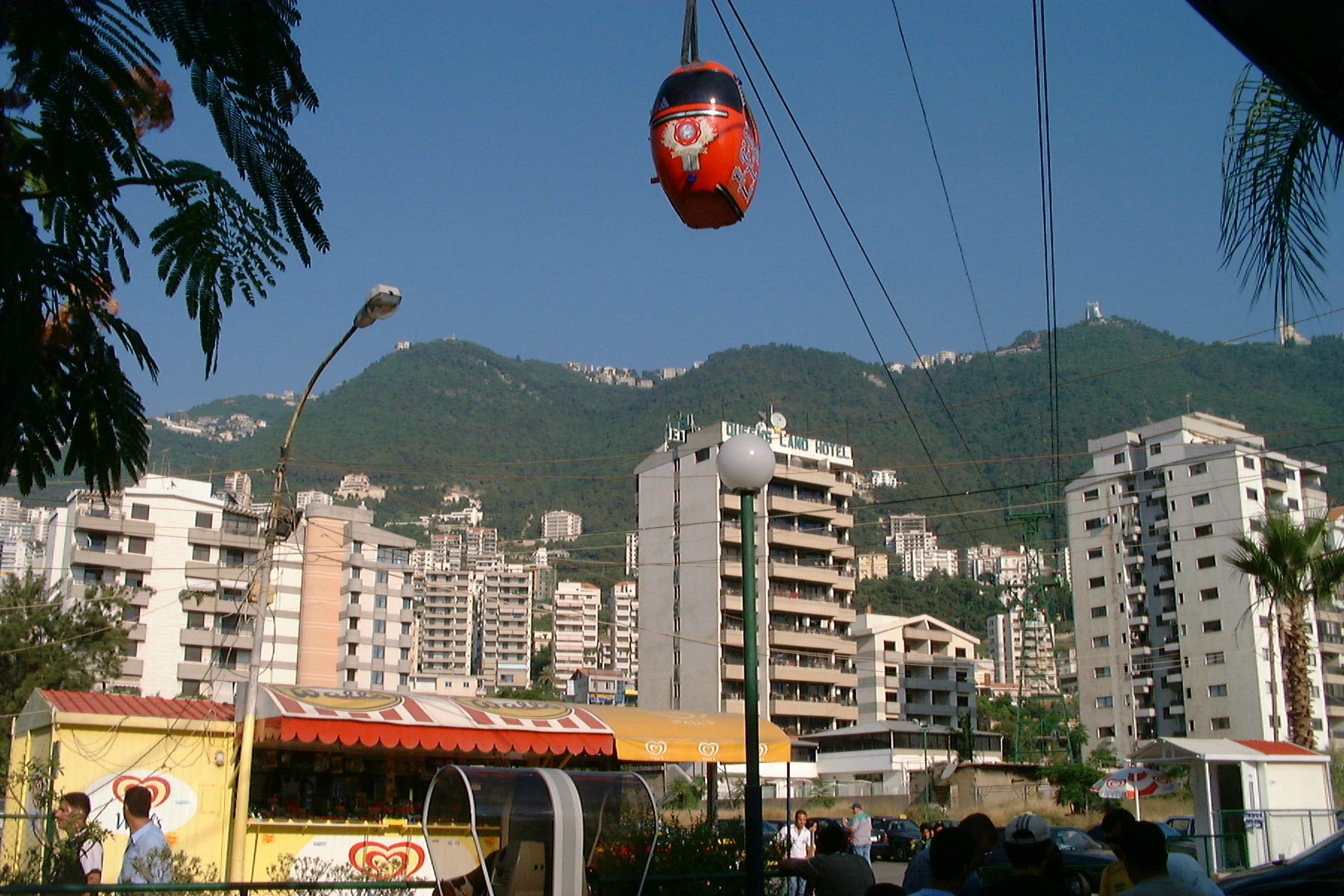 The téléphérique cablecar in Harissa, Lebanon, seen from the ground.